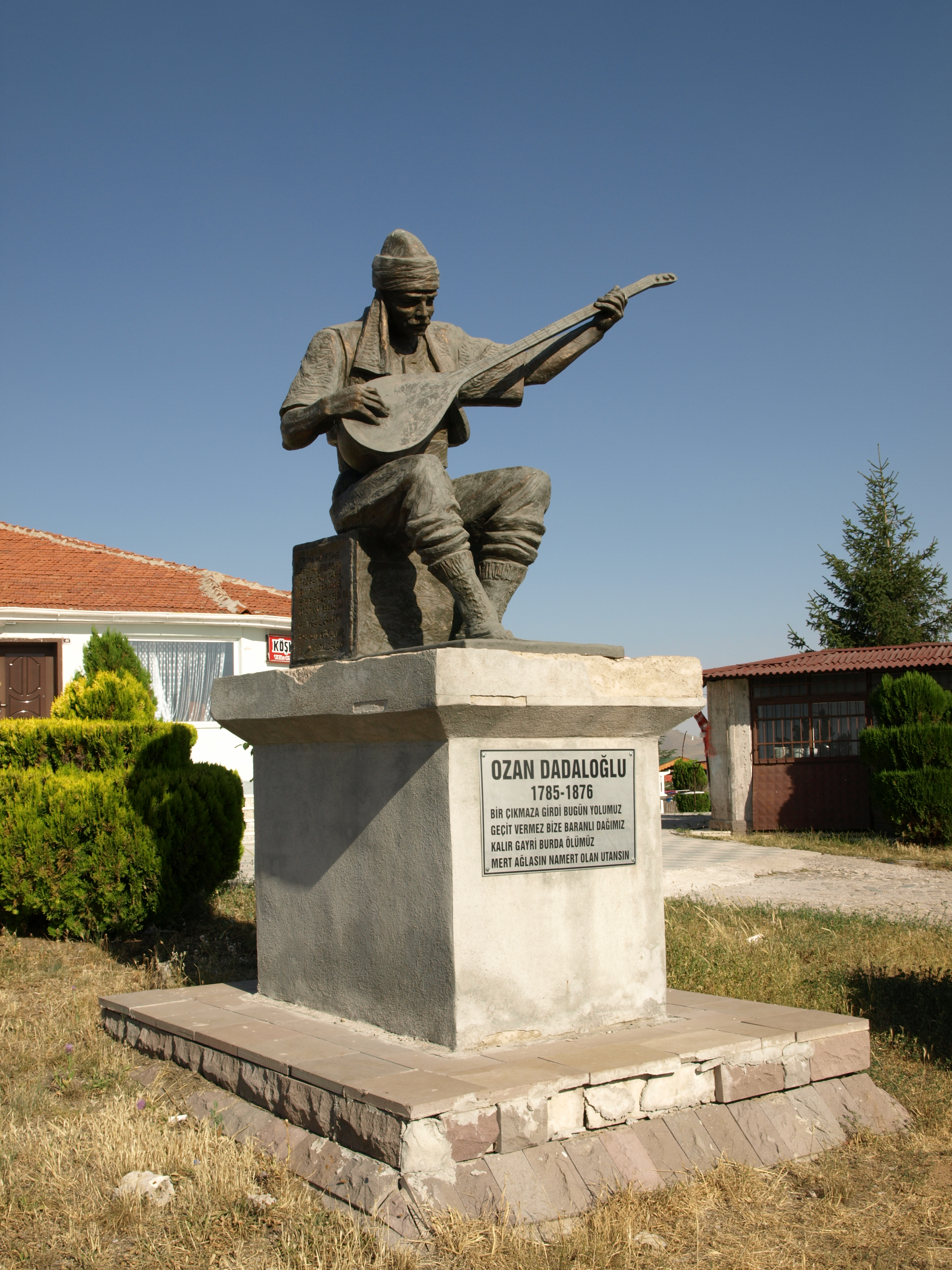 Türk halk şairi Dadaloğlu anıtı, Kırşehir